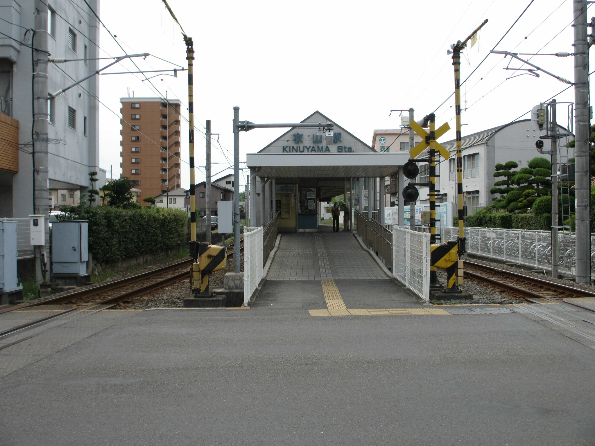 Iyo Railway Kinuyama Station